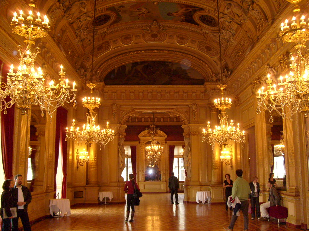 Perspective à travers le grand foyer du Grand Théâtre de Genève